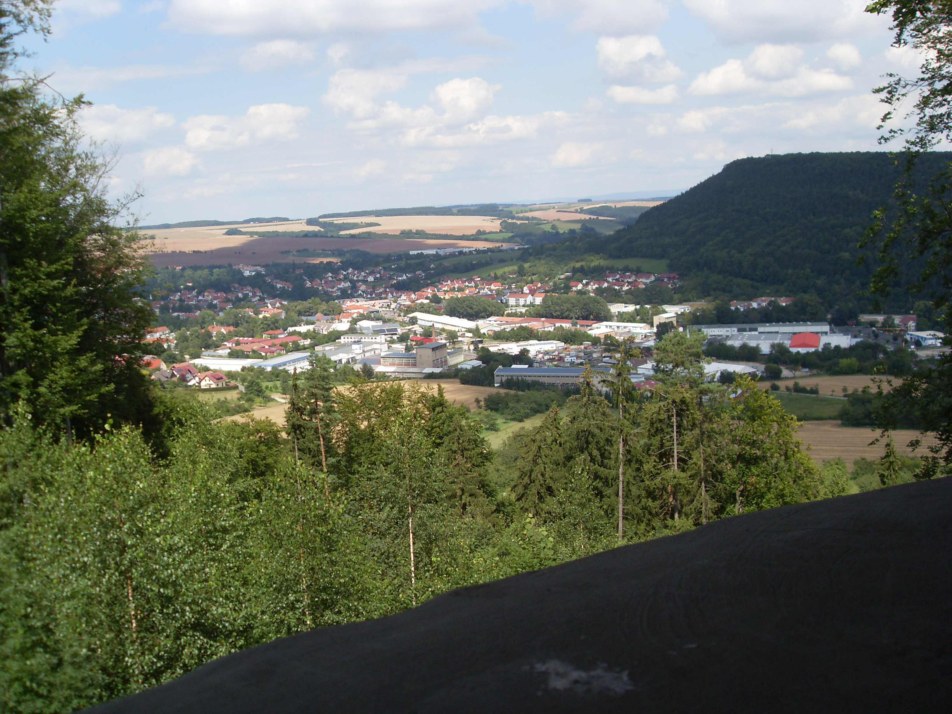 Blick von der Ibergwarte auf den östlichen Teil von Heilbad Heiligenstadt und den Dün